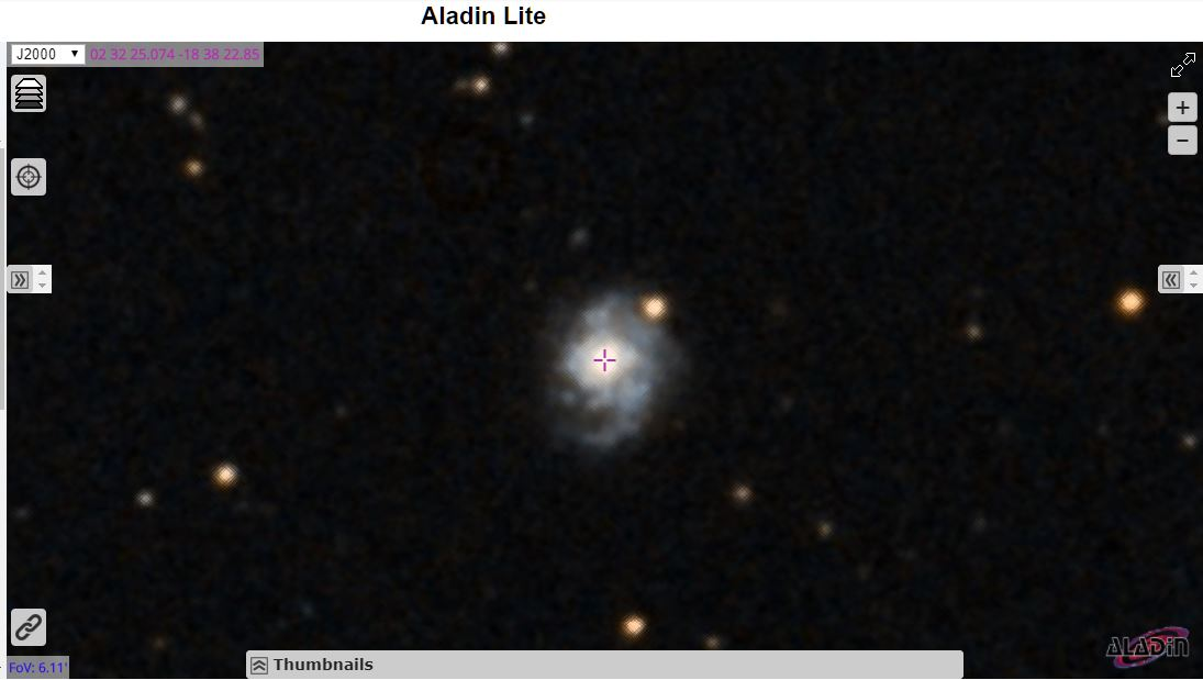 Ces images sont des captures d'écran de la région et de l'objet astronomique affichés par le programme Aladin/Lite que l'on peut utiliser à l'adresse suivante : Le lien dans le texte de la légende permet d'accéder à Aladin Lite et à l'image interactive de l'objet.